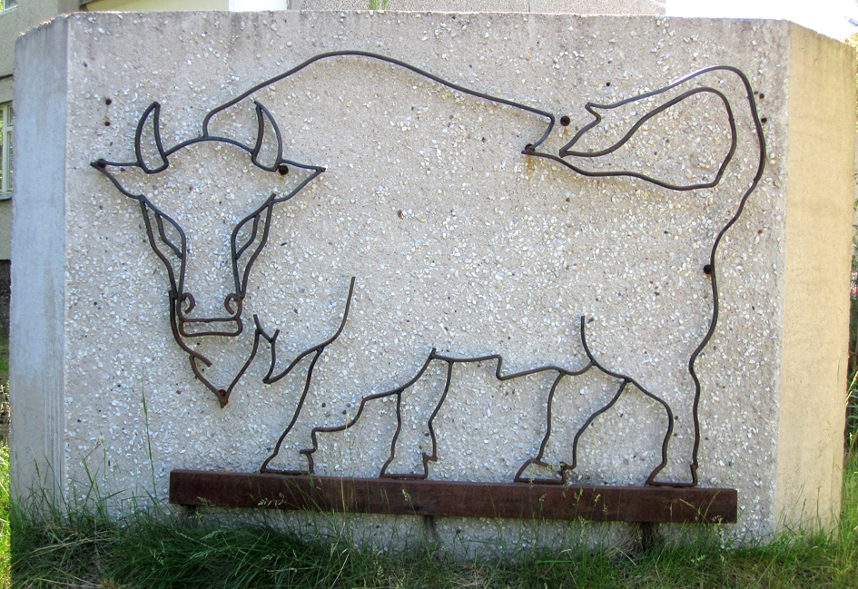 "Aurochs" in Vilnusskaia str. Install in 80s years 20th Century. Author unknown.